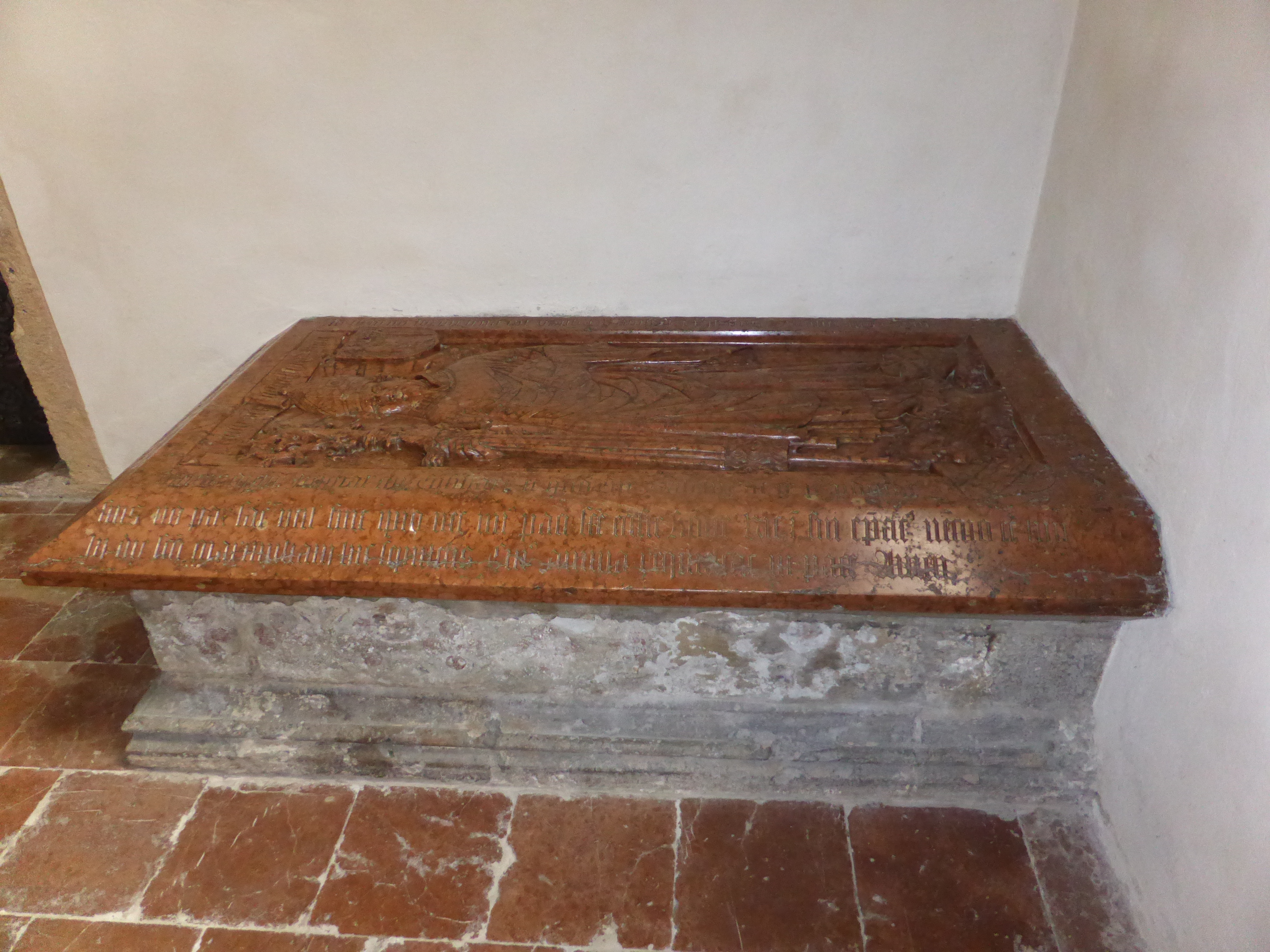 Kath. Pfarrkirche hl. Maximilian